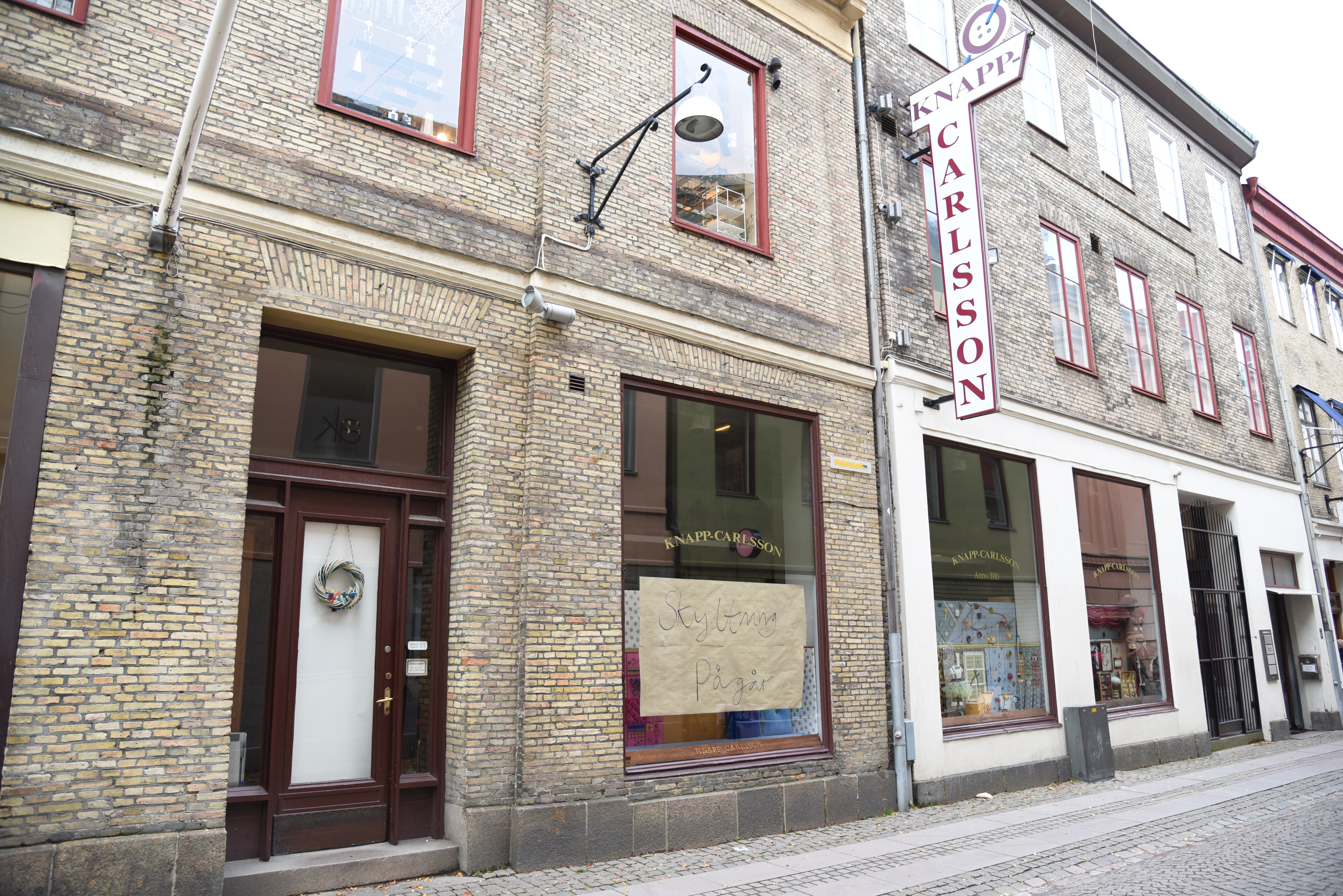 Knapp-Cralsson - sybehörsaffär på Kyrkogatan 34 i Göteborg.